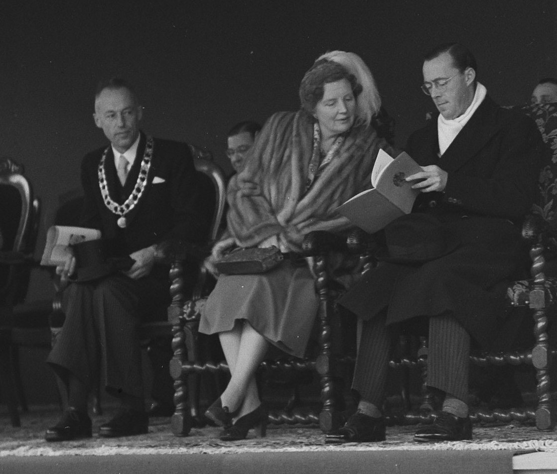 Collectie / Archief : Fotocollectie Anefo Reportage / Serie : [ onbekend ] Beschrijving : Serie: Bezoek koningin Juliana en prins Bernhard aan Friesland. Op het bordes van het Paleis van Justitie aan het Zaailand te Leeuwarden. Links de burgemeester van Leeuwarden, A.A.M. van der Meulen Datum : 26 september 1950 Locatie : Friesland, Leeuwarden Trefwoorden : bezoeken, koninklijk huis Persoonsnaam : Bernhard (prins Nederland), Juliana (koningin Nederland), Meulen, A.A.M. van der Fotograaf : Noske, J.D. / Anefo Auteursrechthebbende : Nationaal Archief Materiaalsoort : Glasnegatief Nummer archiefinventaris : bekijk toegang 2.24.01.09 Bestanddeelnummer : 904-2136